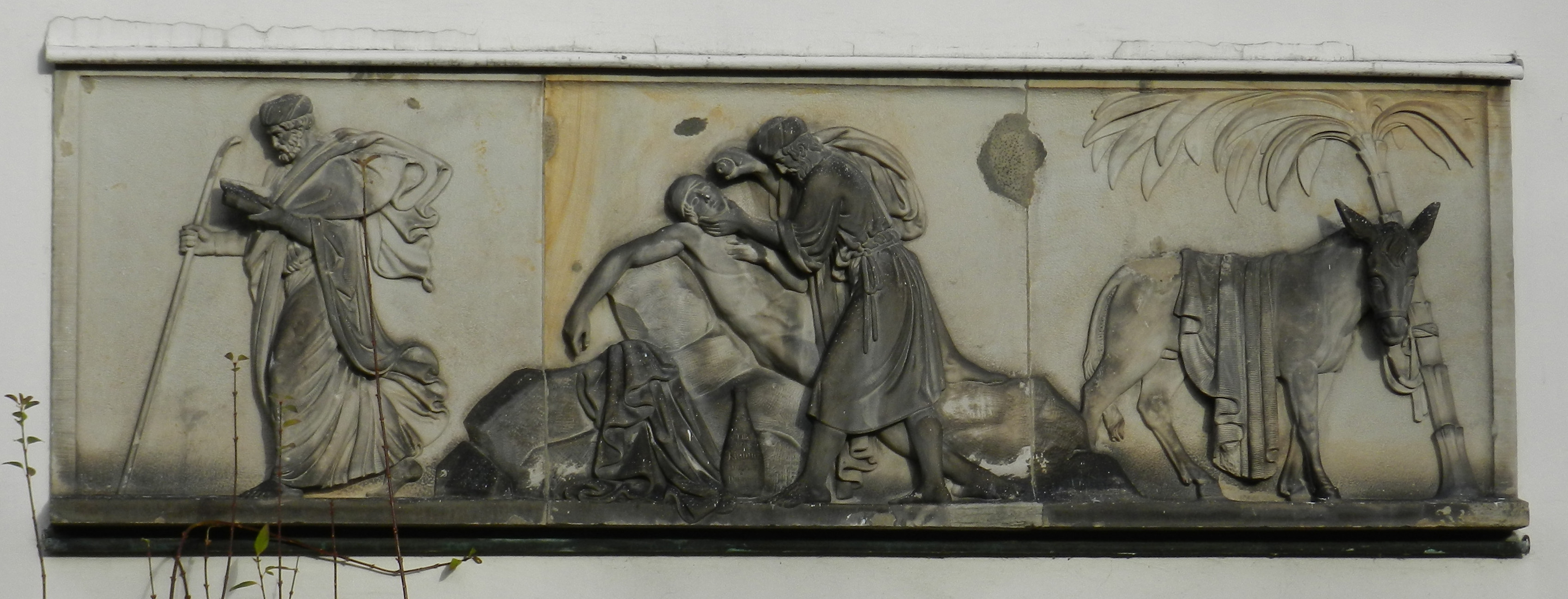 Der barmherzige Samariter ist von Kümmel für die Eingangssituation des früheren Lindener Krankenhauses geschaffen worden. Für ihn war es eine großartige Gelegenheit, als gerade einmal 22 jähriger Künstler eine solch repräsentative Arbeit liefern zu können. Auf der ganz linken Seite sieht man den Leviten, der an dem Hilfsbedürftigen vorbeigeht. Rechts steht der Esel des Samariters, und in der Mitte ist die Hauptszene wiedergegeben. Der Samariter beugt sich über den Niederliegenden und träufelt ihm aus einer Flasche Öl in die Wunden.